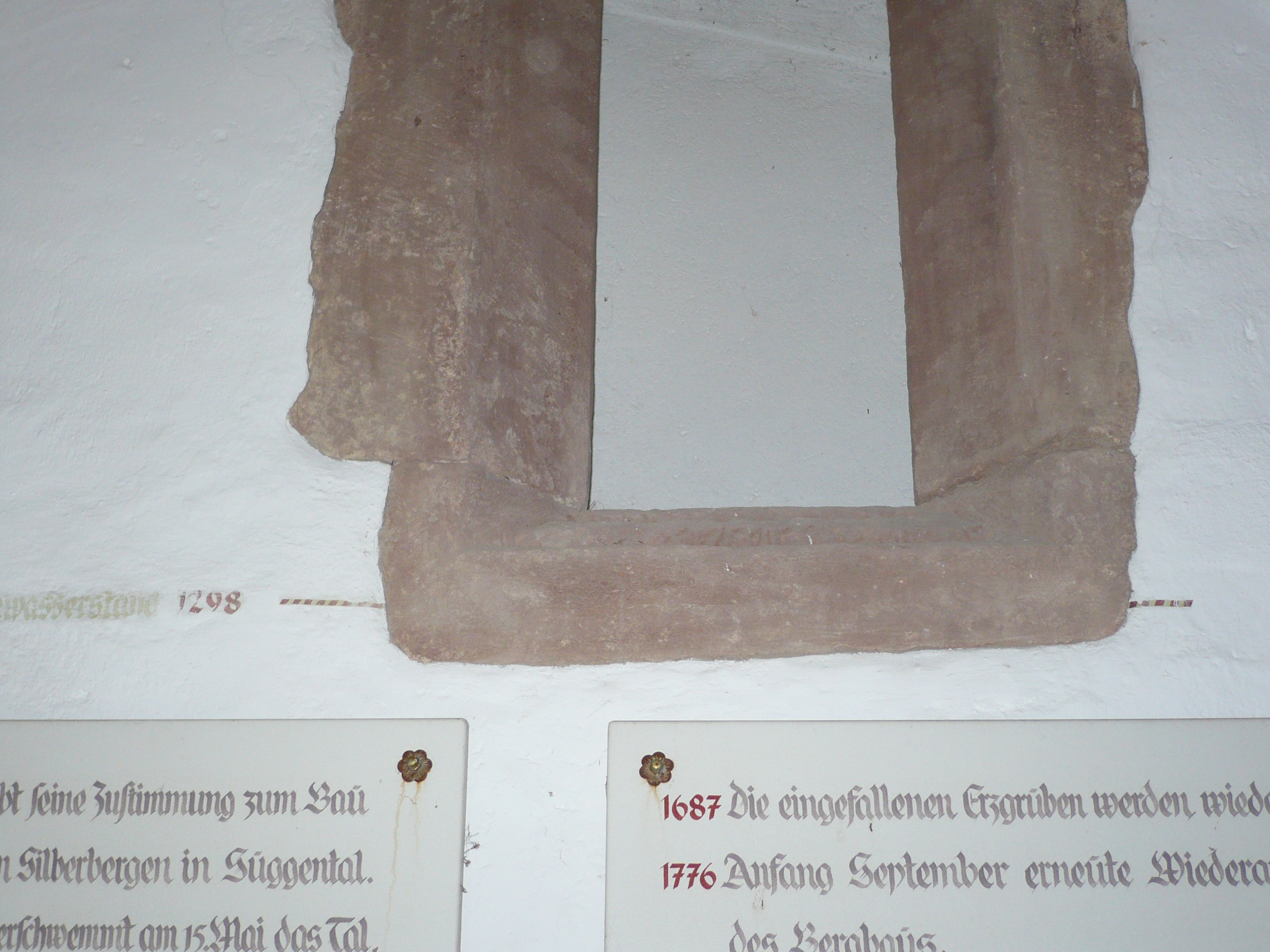 Die vermeintliche Hochwassermarke in der alten Sakristei auf dem Friedhof von Suggental